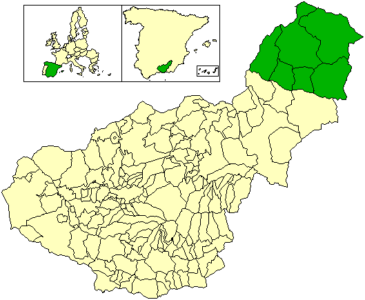 Mapa del partido judicial de Huéscar, en la provincia de Granada (España)